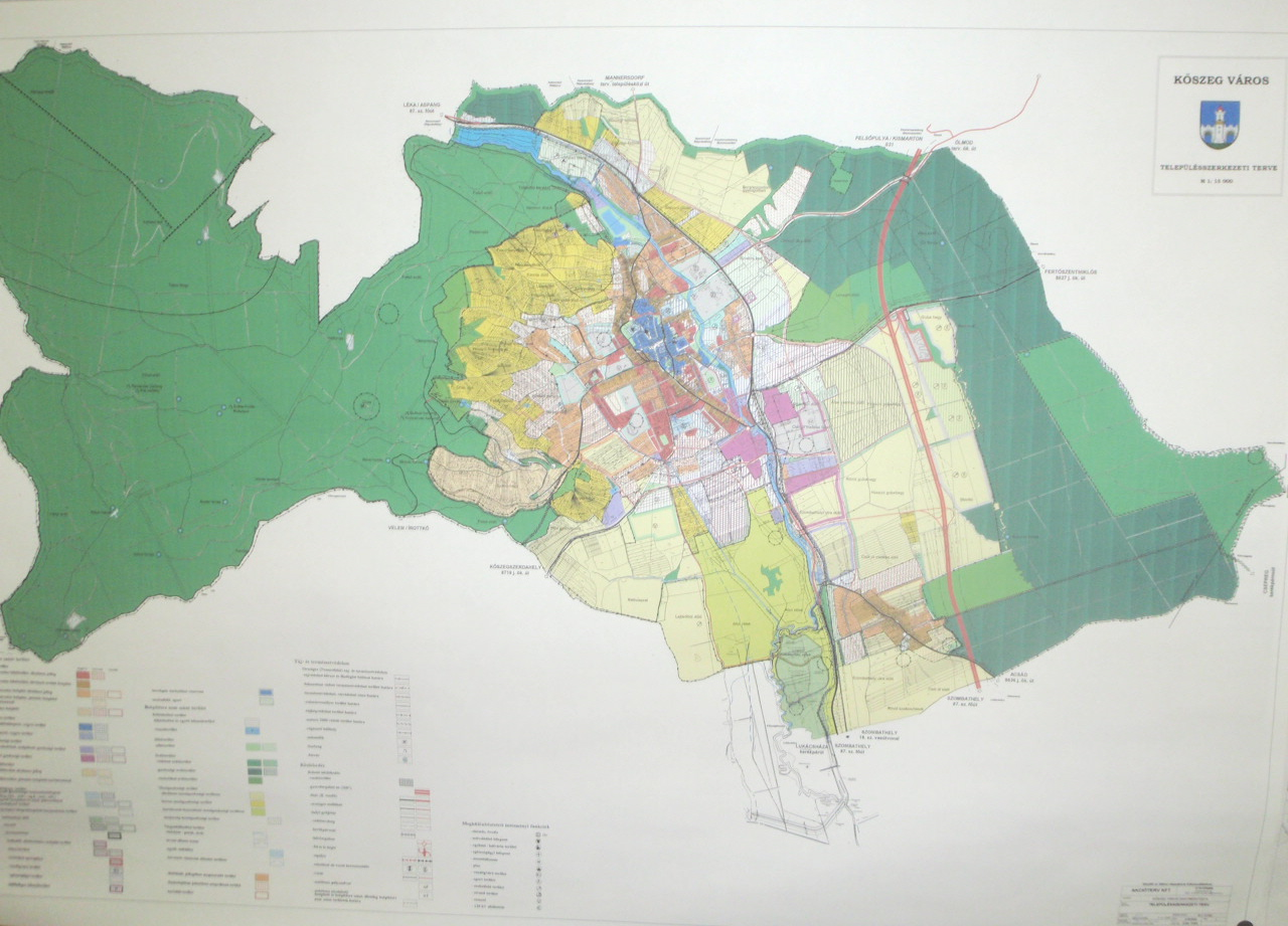 Siednungsplan von Güns